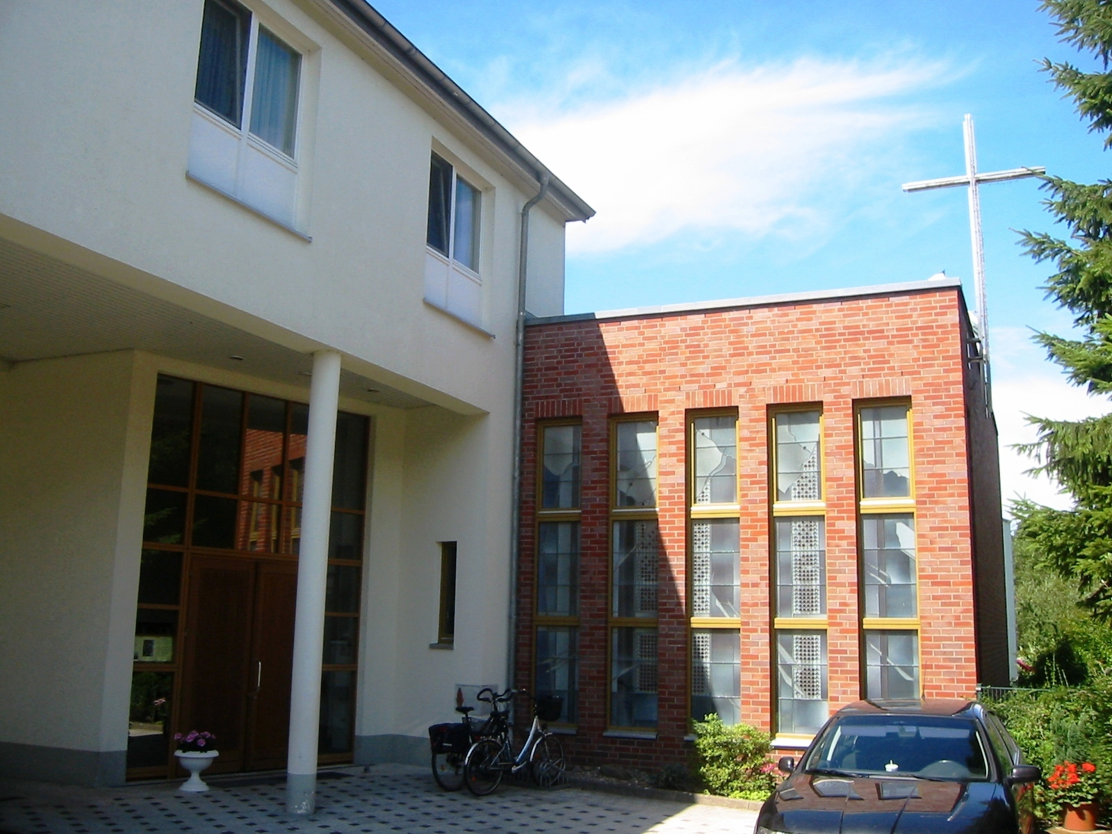 St.-Ursula-Kirche in Graal-Müritz Die Filialkirche gehört zusammen mit der Kirche St. Paulus in Marlow und der Pfarrkirche Maria-Hilfe der Christen St. Klara in Ribnitz-Damgarten zur Katholischen Kirche Ribnitz